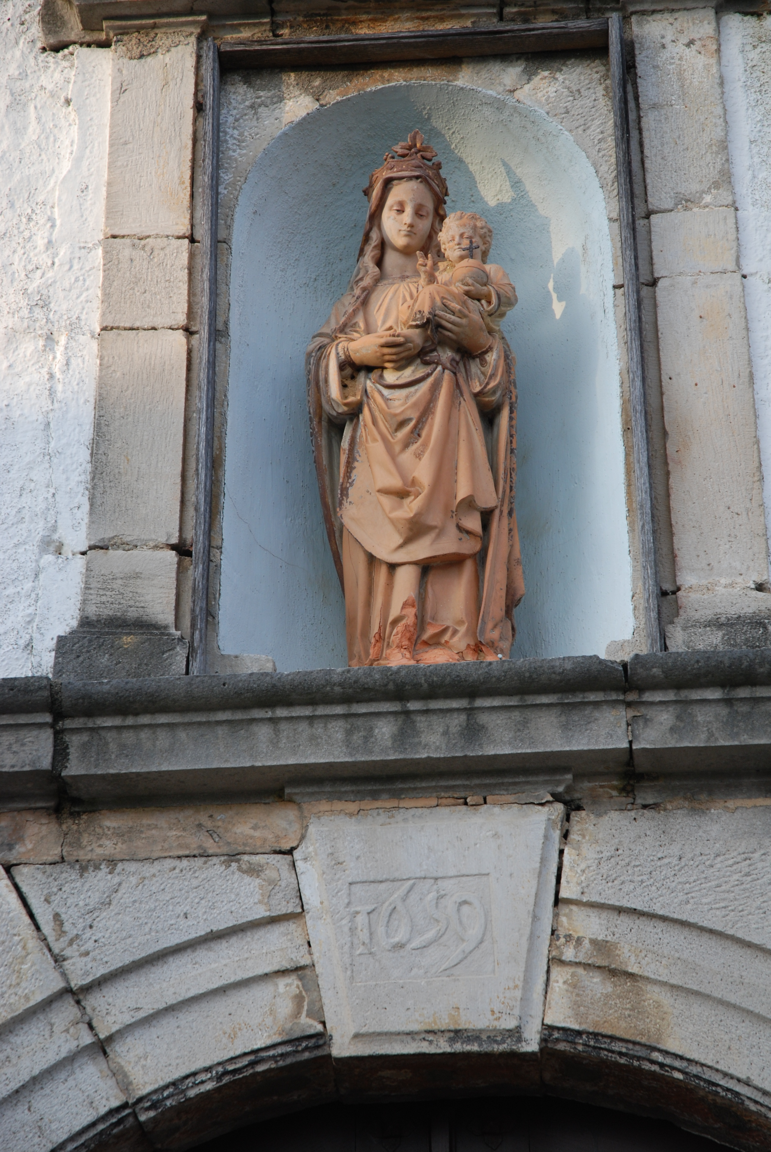 Ahetze (Pyrénées-Atlantiques), entrée de l'église